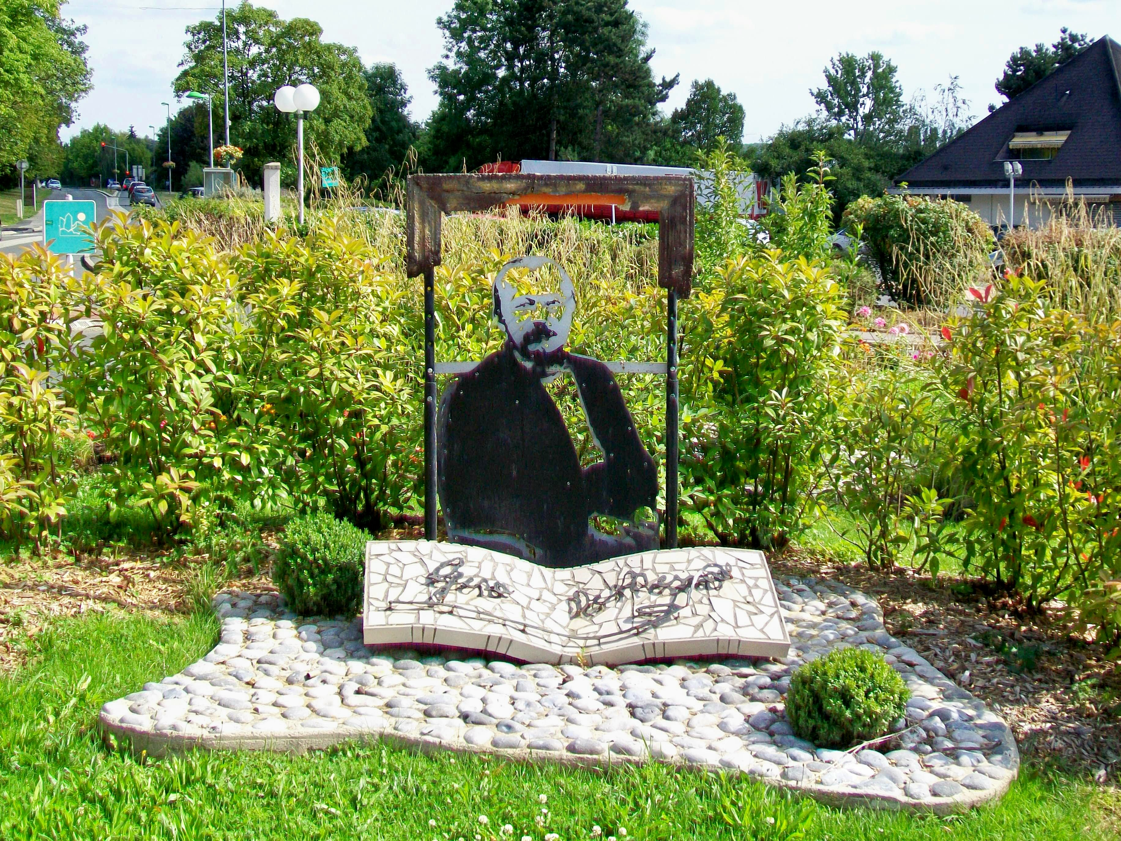 Le monument pour Gérard de Nerval, rue Gérard de Nerval, sur le rond-point en face de l'église.